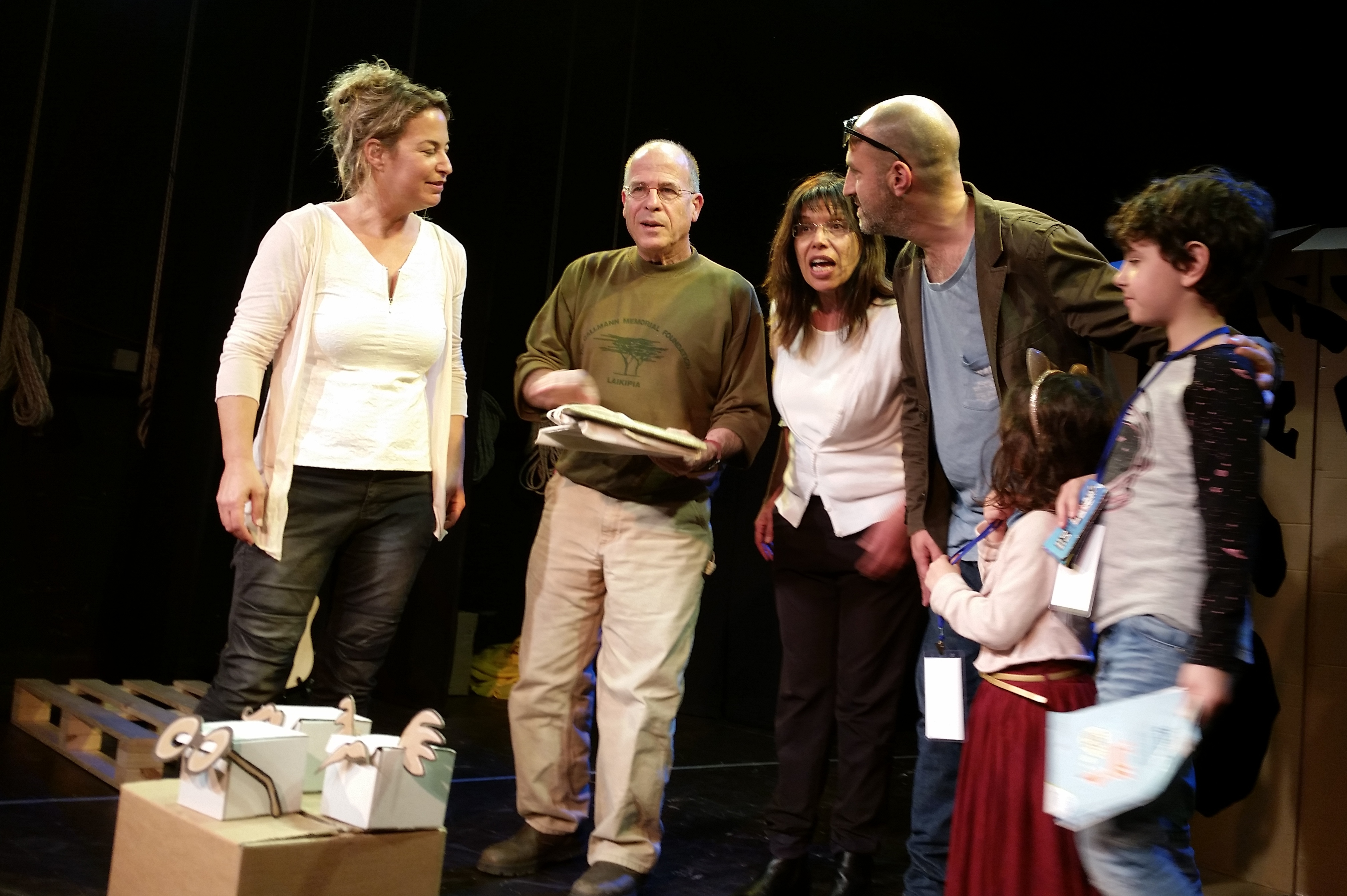 מאיר שלו והצוות בסיום ההצגה "הגשם של סבא אהרון" בפסטיבל חיפה להצגות ילדים